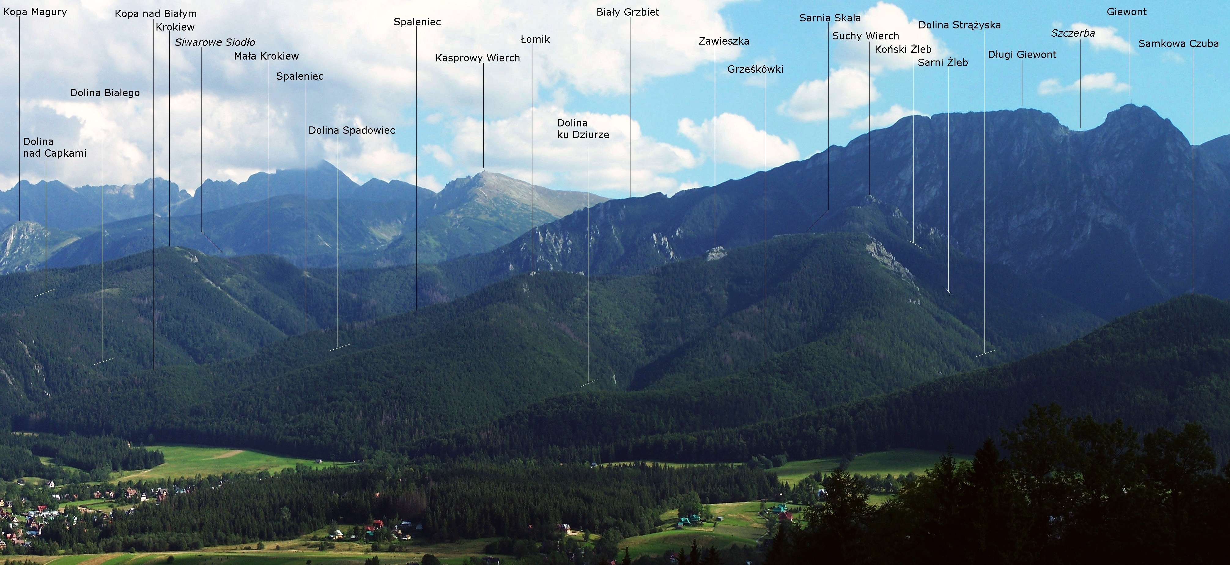 Widok z Pasma Gubałowskiego, spod Wyciągu Szymoszkowego